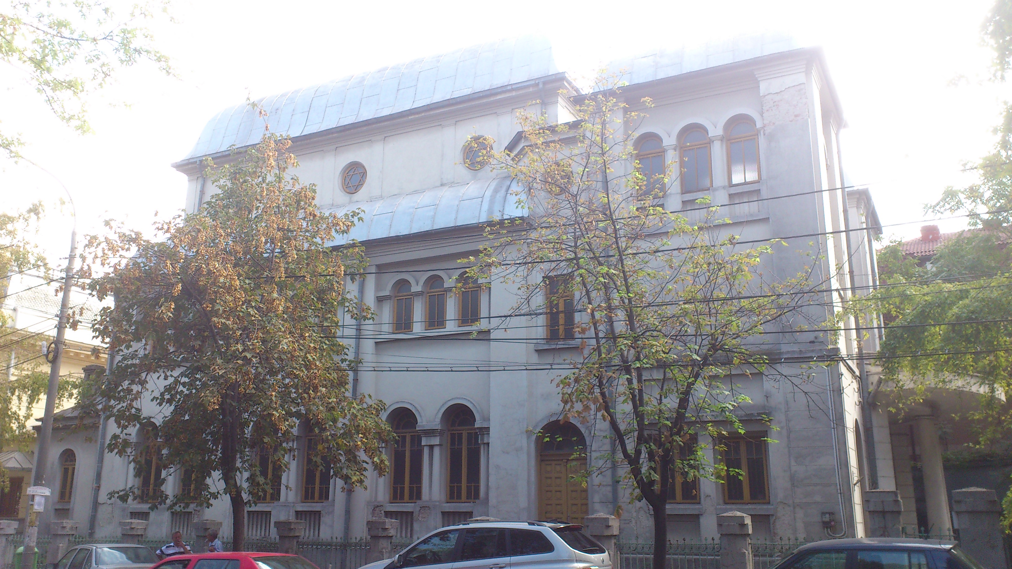 Sinagoga din Pitești